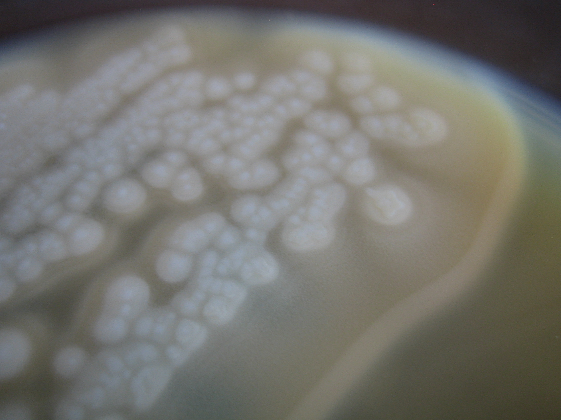 Clostridium botulinum NCTC 7272, Toxintyp: A auf AEY-Agar